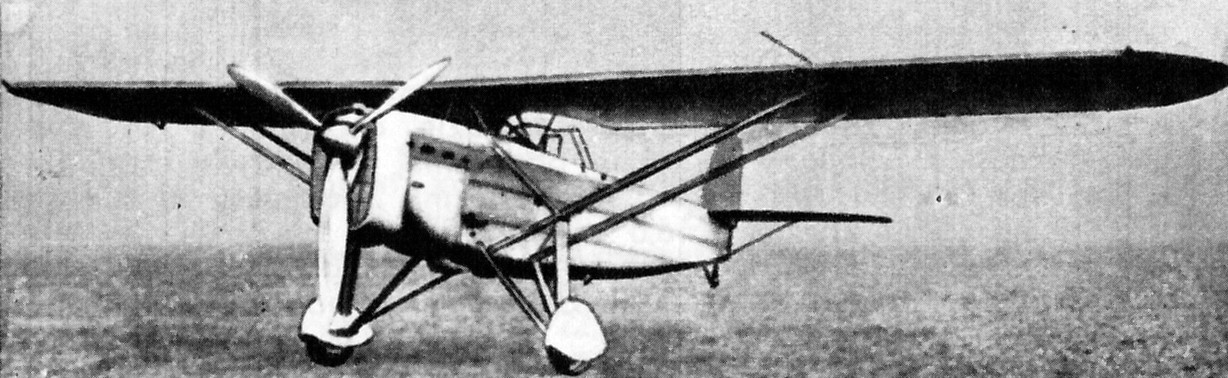 Francuski samolot rozpoznawczy ANF Les Mureaux 115 R2.